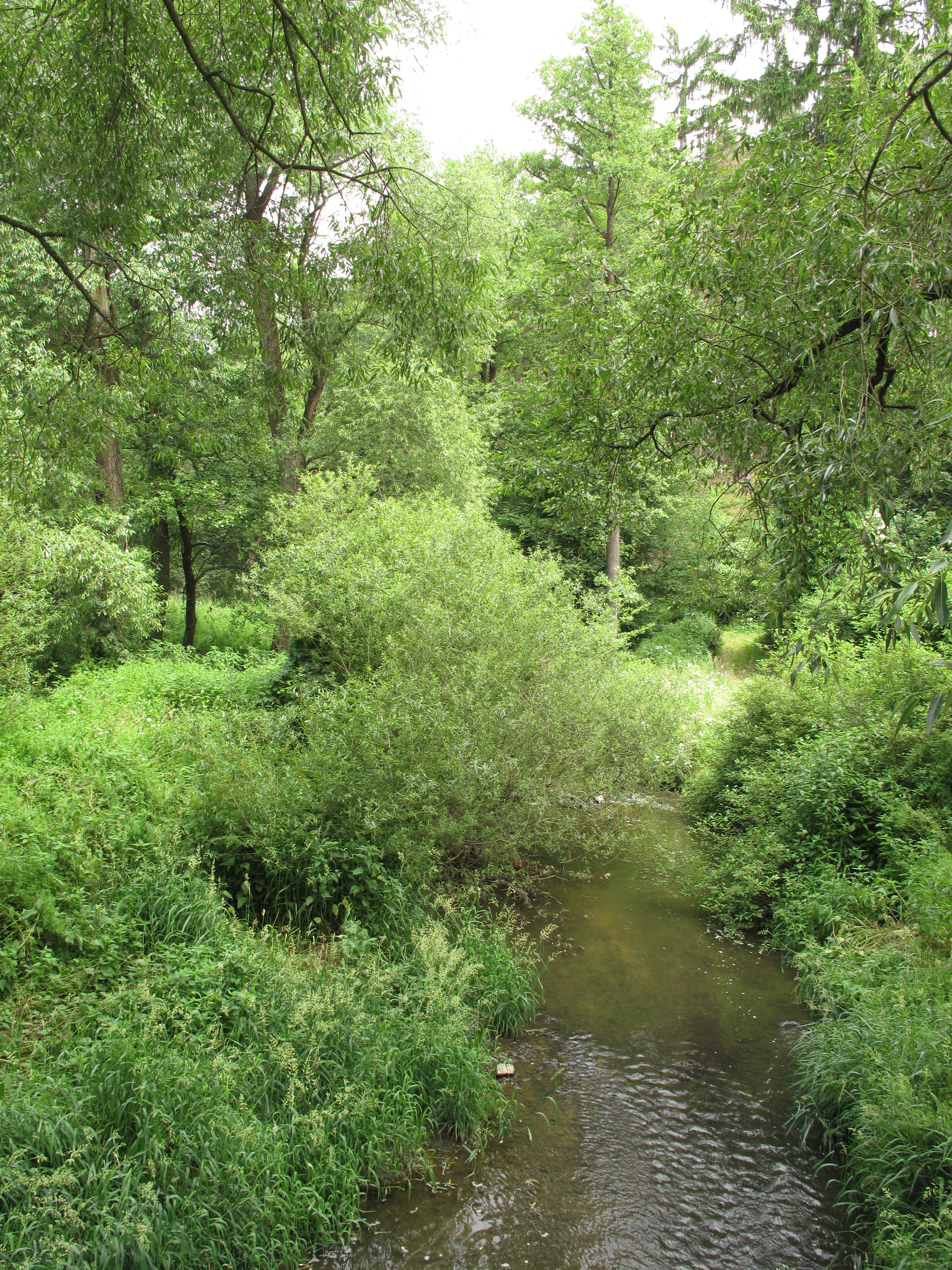 Hanov (Zběšičky), Česká republika.